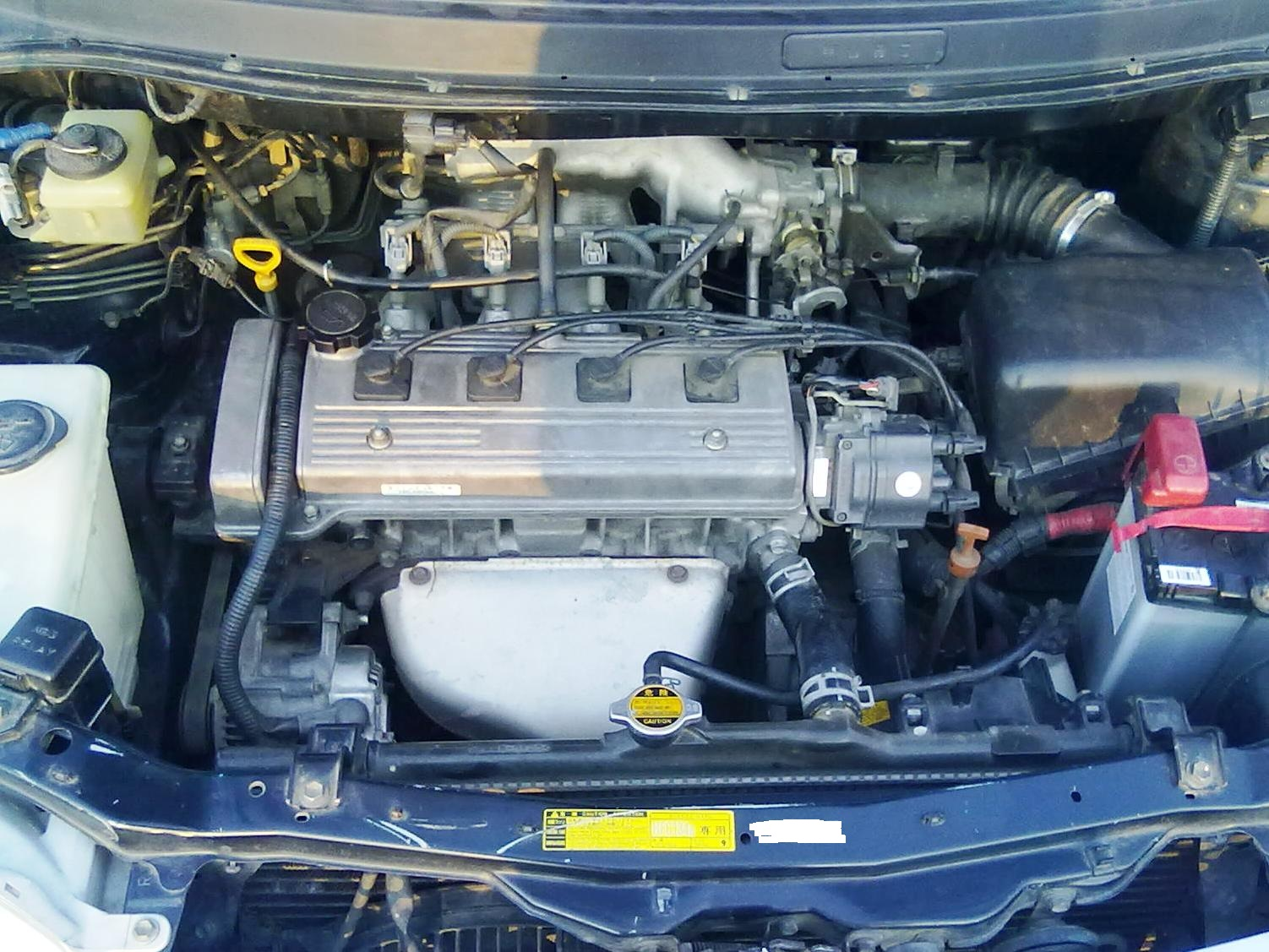 Моторный отсек Toyota Corolla Spacio, двигатель 4A-FE